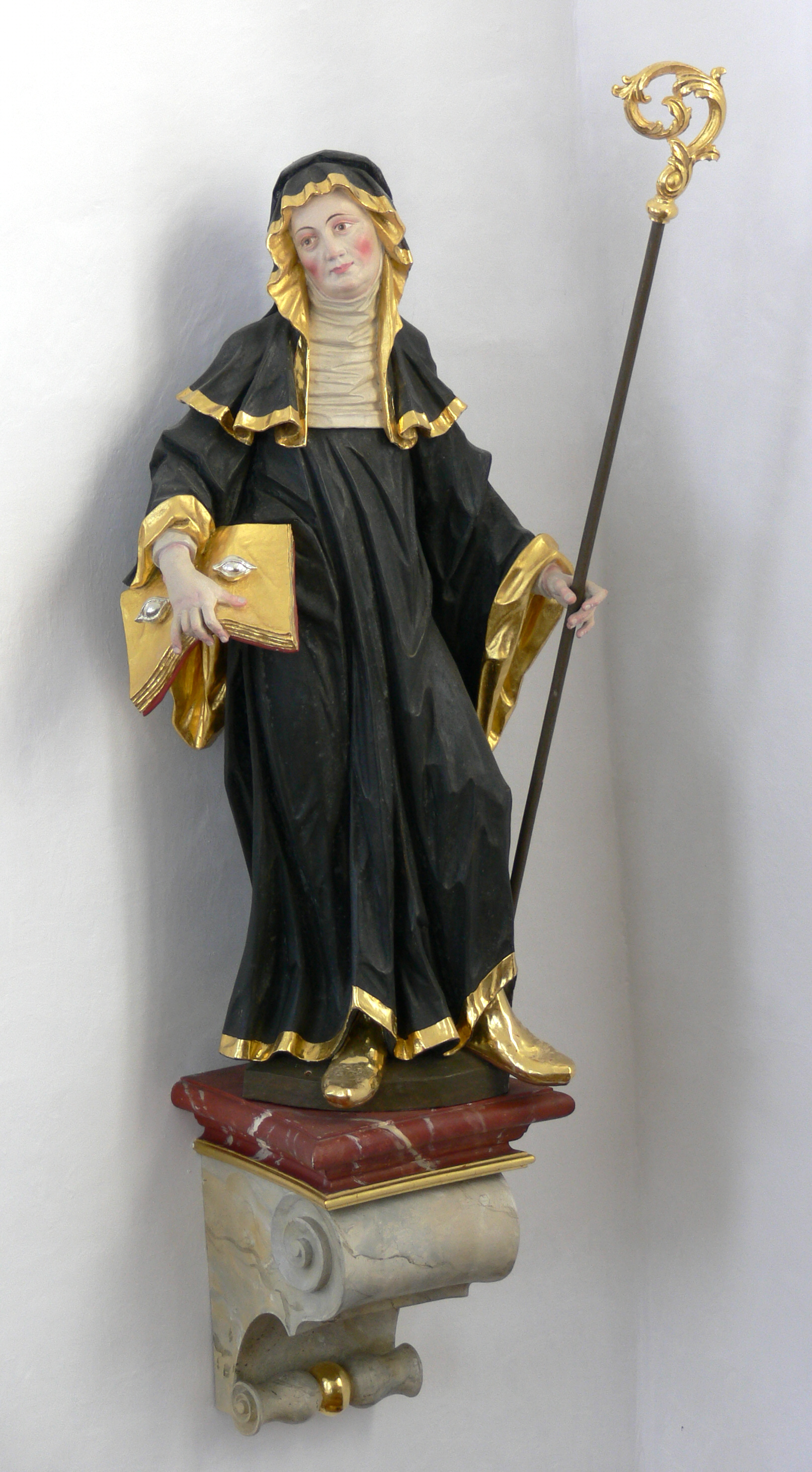 Kapelle St. Wendelin, Bremenried, Weiler-Simmerberg (Landkreis Lindau, Bayern); geweiht als Kapelle eines Leprosiums am 19. Oktober 1717 Hl. Odilia (Attribute: Äbtissinenstab, Buch mit zwei Augen)